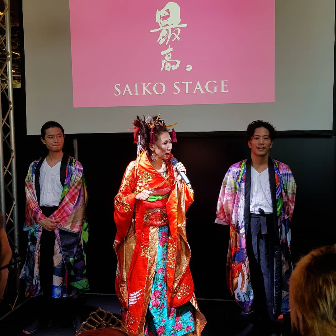 Yoko Takahashi canta "Zankoku na tenshi no teze" ("The Cruel Angel's Thesis"), sigla di "Neon Genesis Evangelion", durante il Japan Expo 2019 di Parigi. Caricata su Wikipedia con il permesso dell'autore originale, presente all'evento.